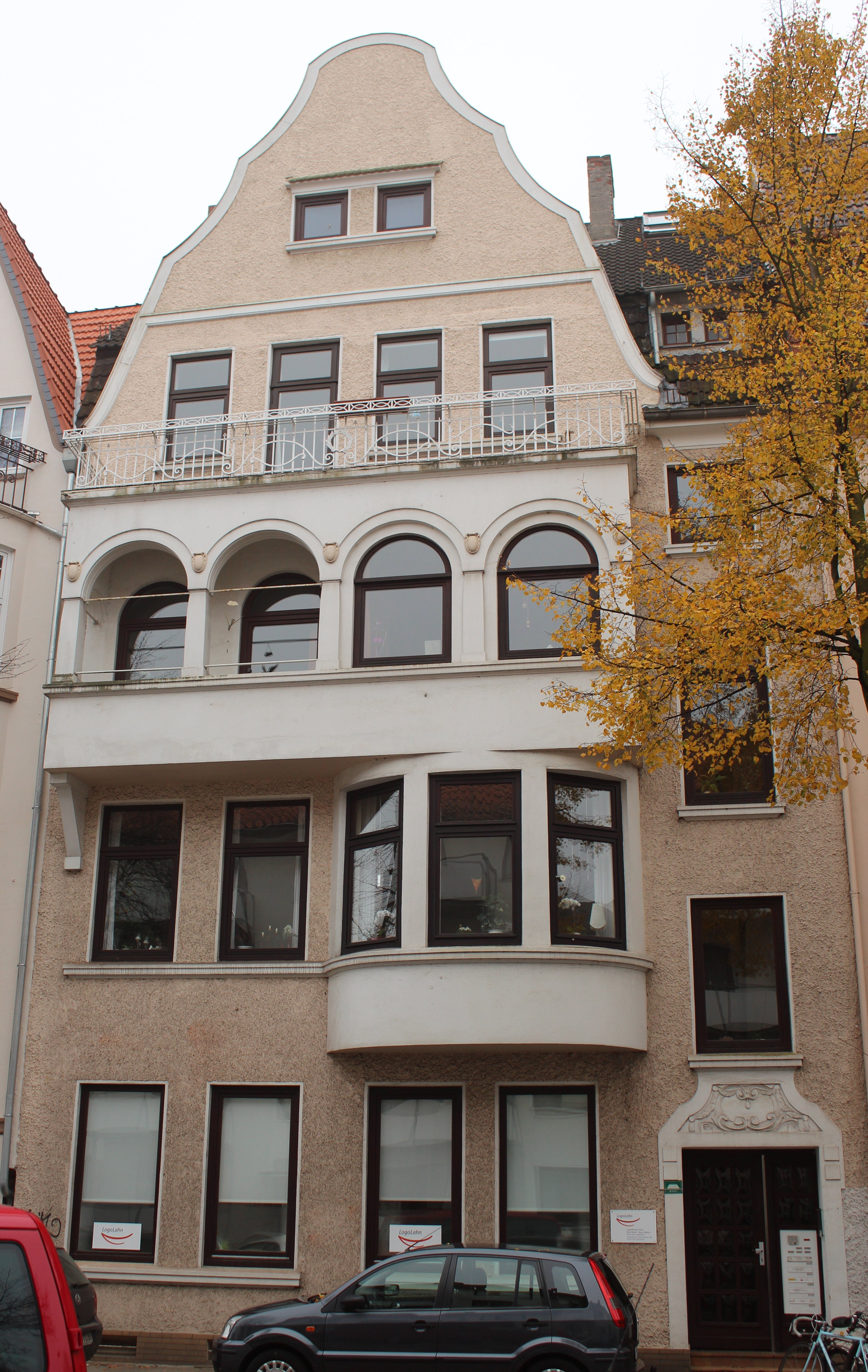 Mietshaus in Bremen, Lahnstraße 29. Das abgebildete Objekt ist ein geschütztes Kulturdenkmal in der Freien Hansestadt Bremen, mit der Nr. 0825 beim Landesamt für Denkmalpflege registriert.